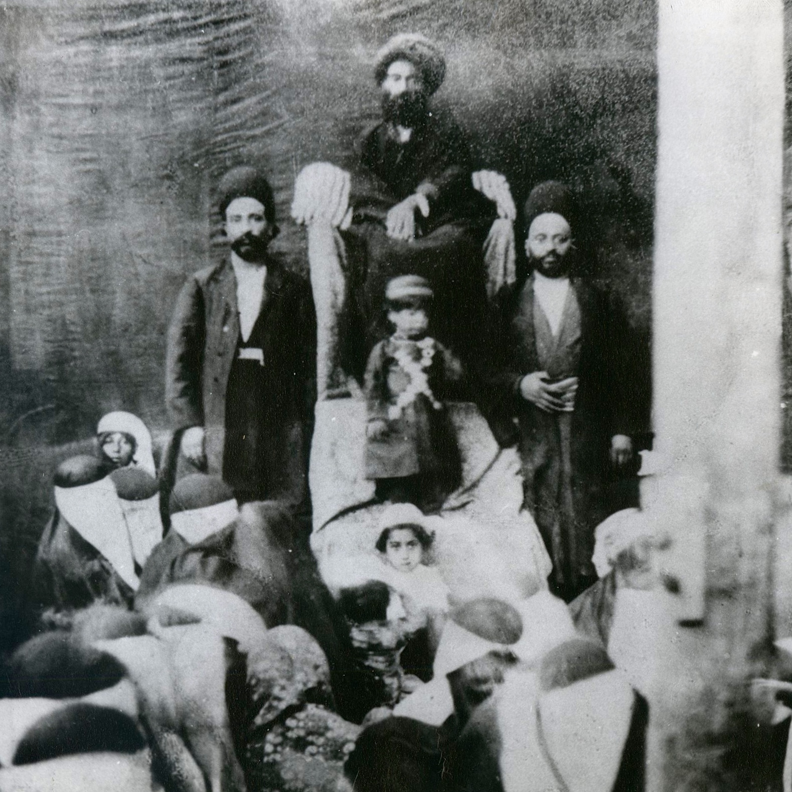 شخص نشسته روی منبر حاج سید غلامحسین مجد مجابی-کودک ایستاده جلوی منبر احمد شاه قاجار -دو نفر در طرفین کودک محافظین شاهزاده میباشند-این عکس در سال1319 قمری در یکی از تکیه های دولتی گرفته شده